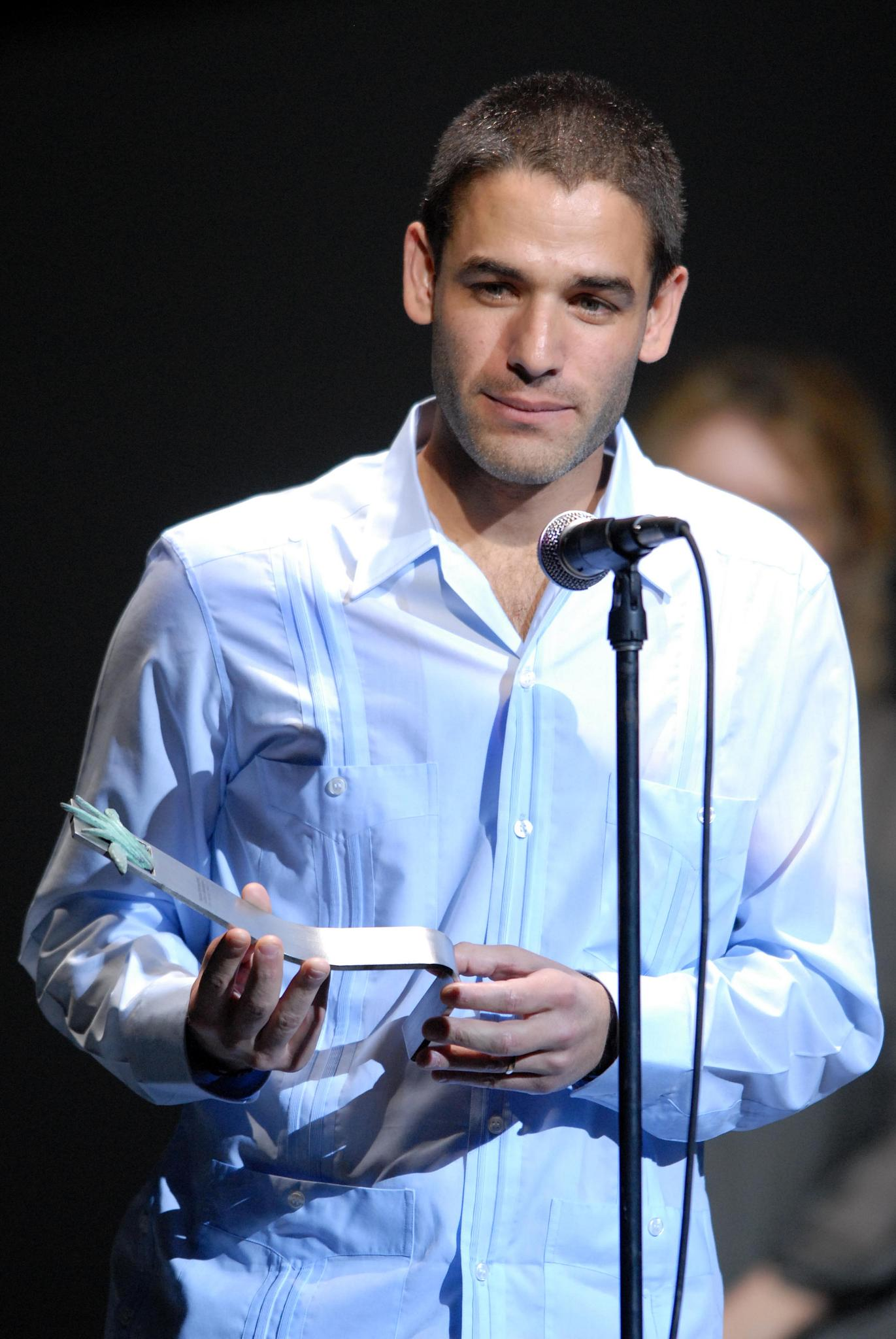 Guadalajara, Jalisco, 14 marzo de 2008. Fernando Eimbcke, director de la película Lake Tahoe, quien ganó el premio a mejor director en la categóría de largometraje mexicano de ficción del XXIII Festival Internacional de Cine en Guadalajara. Entregó el premio Sandra Den Hamer.